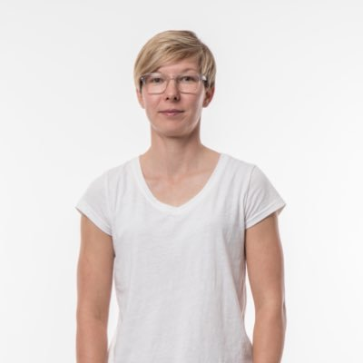 Profilfoto von Ann-Kathrin Lindner